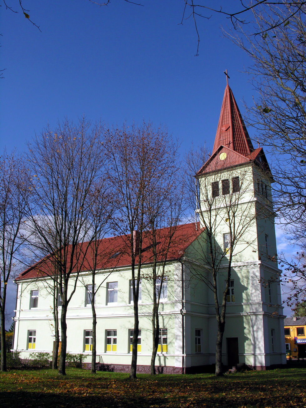 Žemaitėška: Mažeikē, liuteruonu bažnyčė Puortegraėjė Algėrda, 2006 m. spalė 27 d., Žemaitėjė